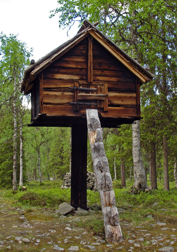 Samisk stolpbod (njalla) vid Jillesnåle kapell i Sorsele kommun.